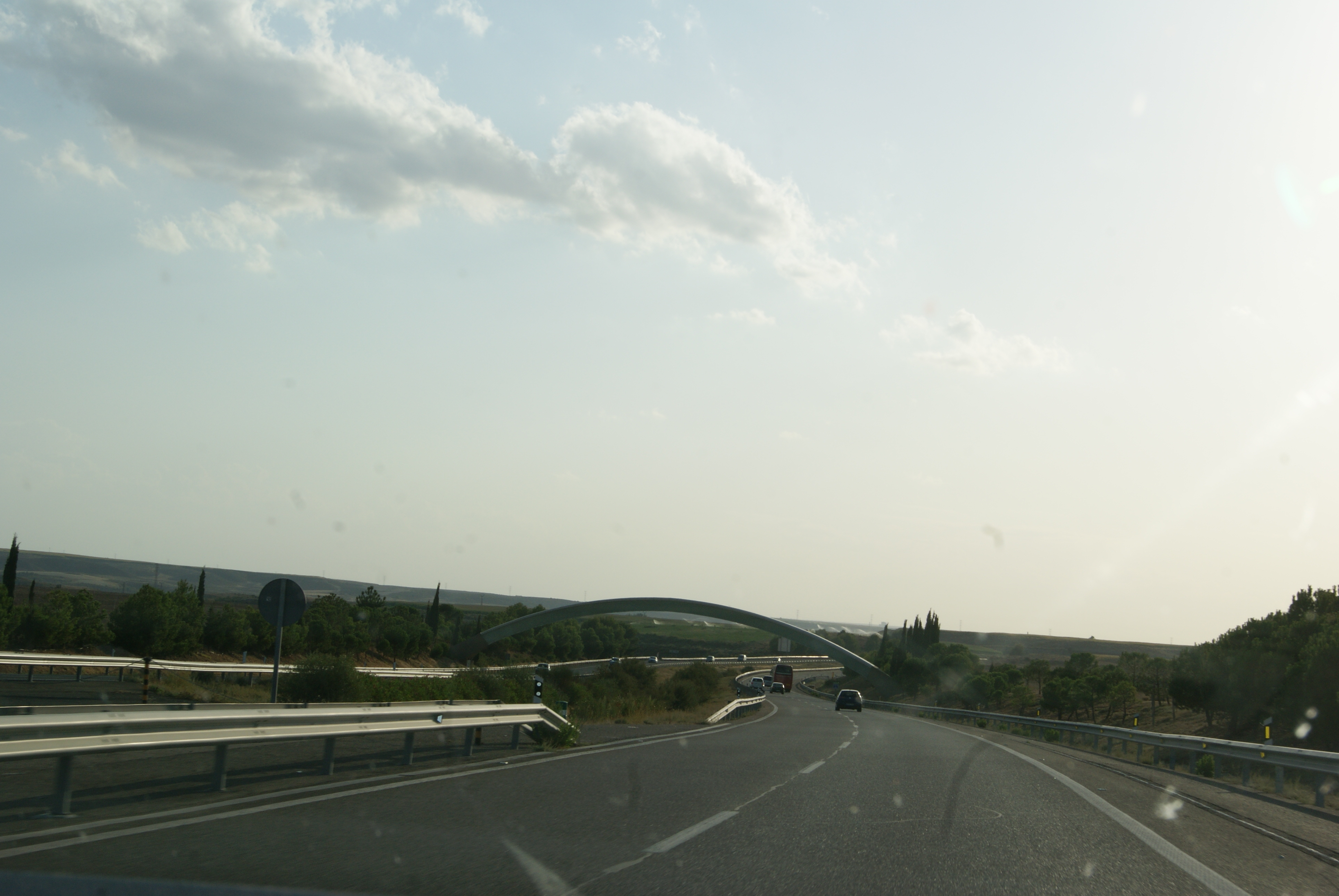 El meridiano en Barcelona